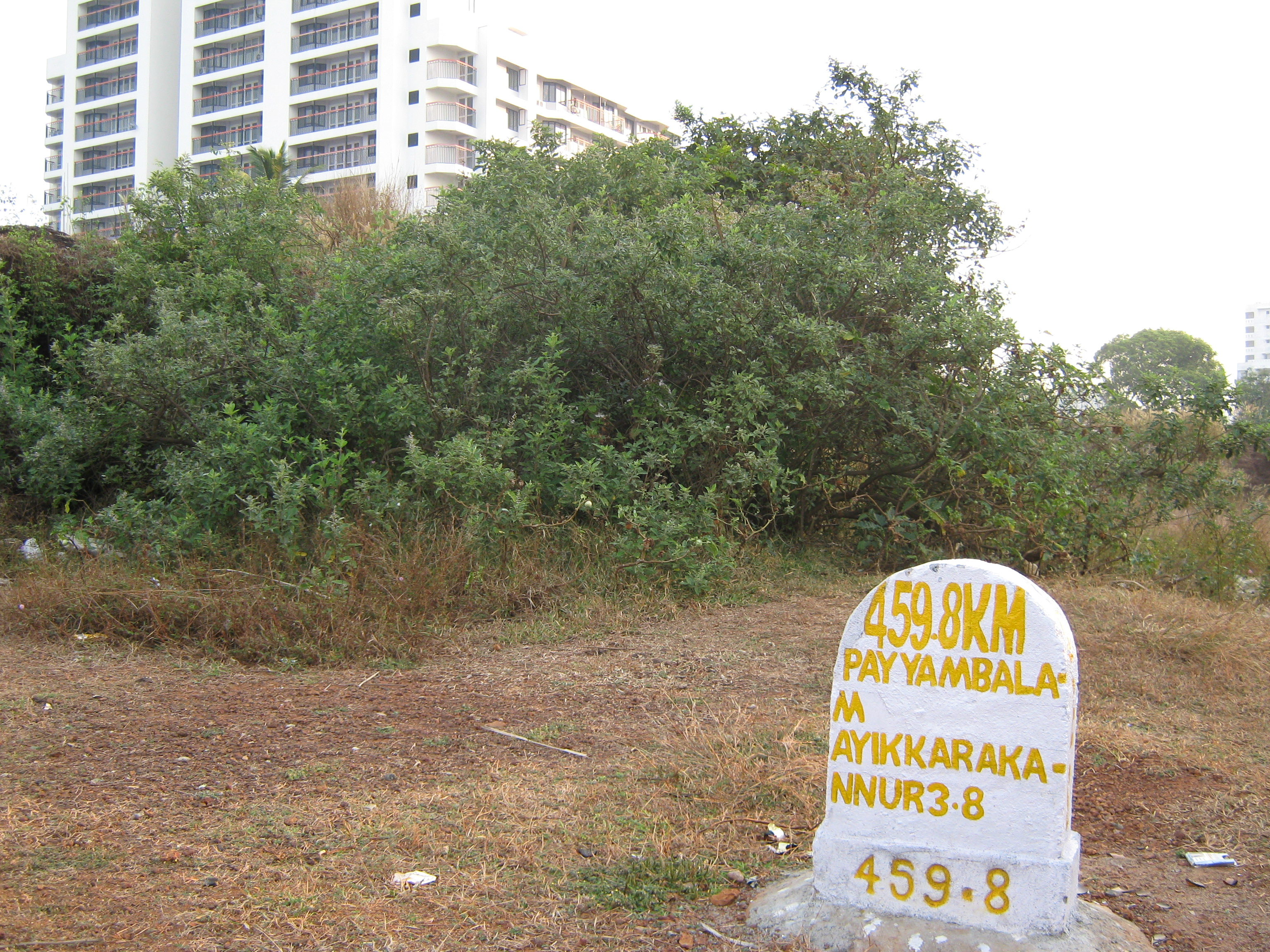 Payyambalam, Kannur, Kerala, India.